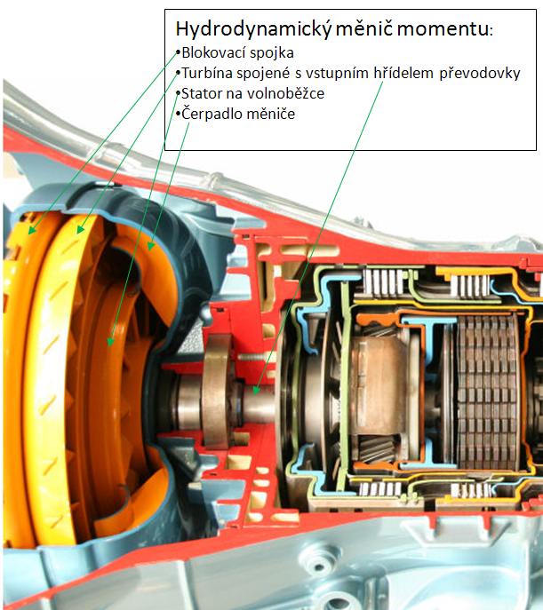 Das 6 HP 26 Automatikgetriebe der Zahnradfabrik Friedrichshafen (ZF). Technische Daten: * 6 Vorwärtsgänge, 1 Rückwärtsgang * 89 kg mit Öl * Leistungsbereich bis 320 kW bei 5800/min Der Getriebeeingang (Motorseite) ist links am Wandler (gelb) Bilddaten: * Autor: Benutzer:Ralf Pfeifer * Erstellt: 26.07.2006 * Ort: Deutsches Museum München